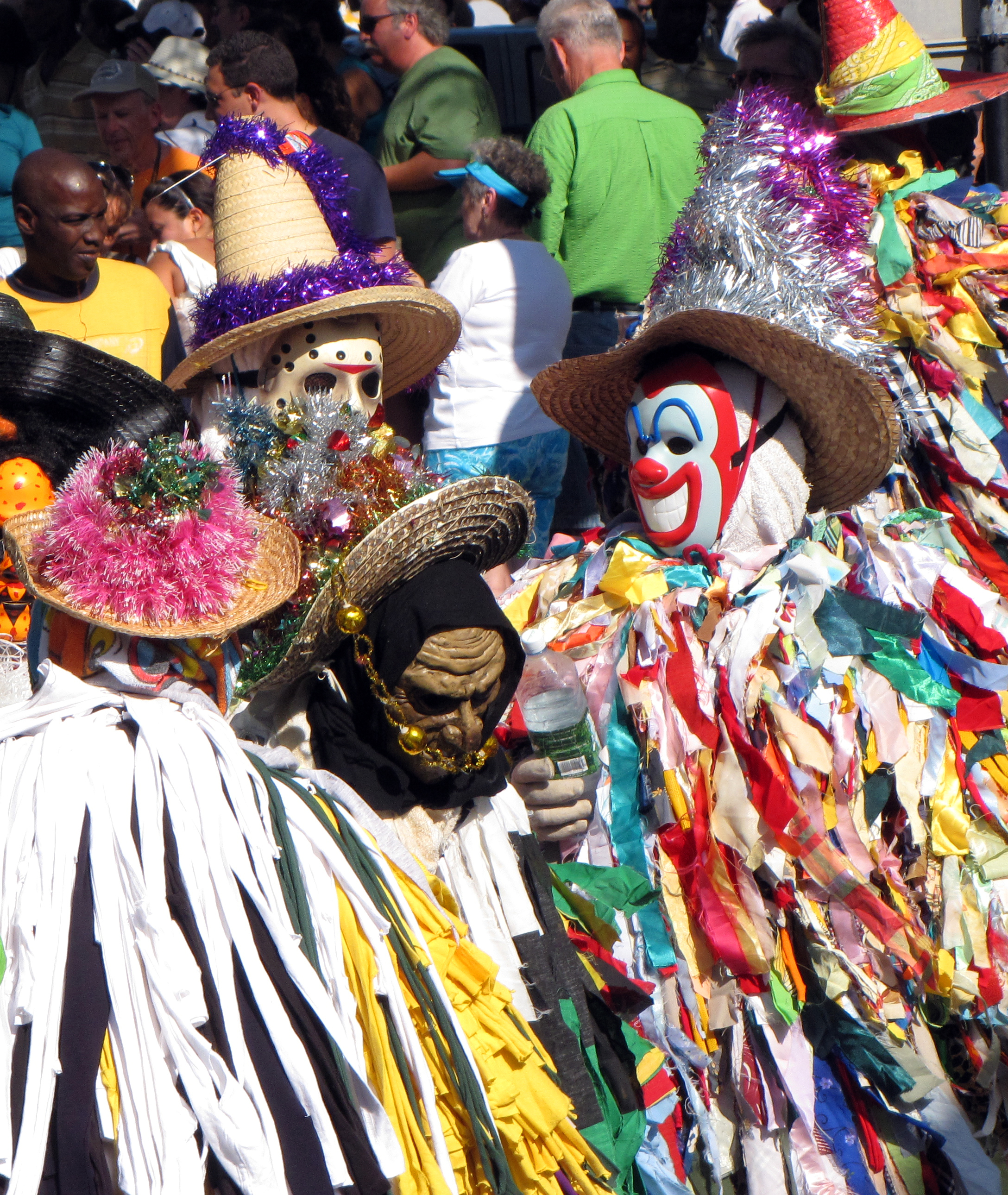 Carnaval de l'Ile de la Dominique